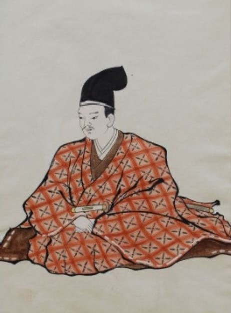 大浦盛信の肖像。